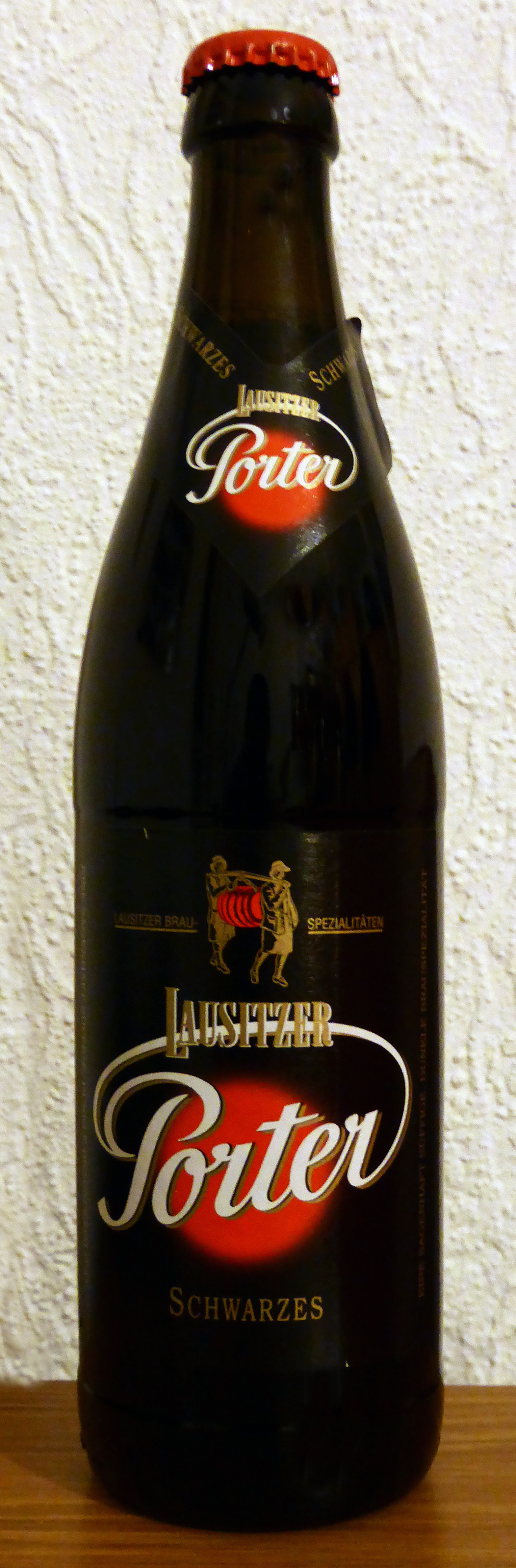 Flasche Lausitzer Porter-Schwarzbier, 2014.